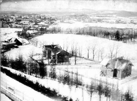 Utsikt fra St.Hanshaugen mot Bislett og Korpehaugen. Louises gate 28, 30 og 34 i forgrunnen. Bygningene på Rolighet til venstre.